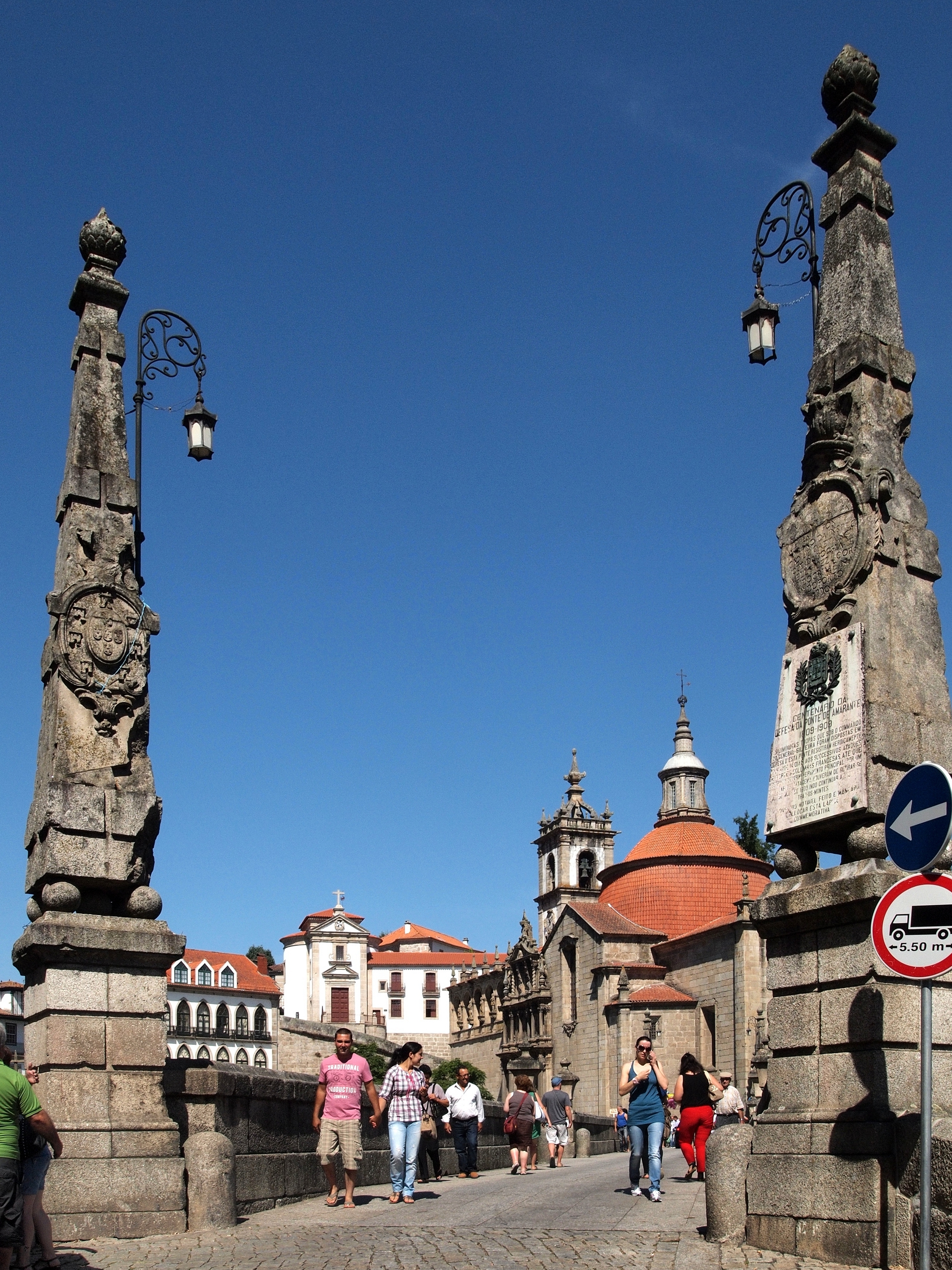 Amarante